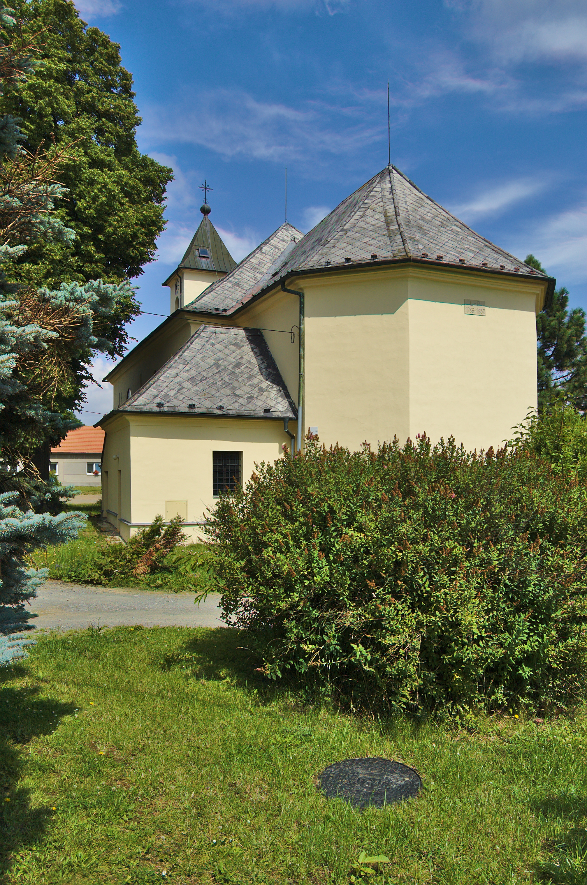 Kostel Povýšení svatého Kříže, Benešov, okres Blansko